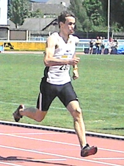 Niederösterreichische Landesmeisterschaft 2012 200m-Lauf vor Ziel